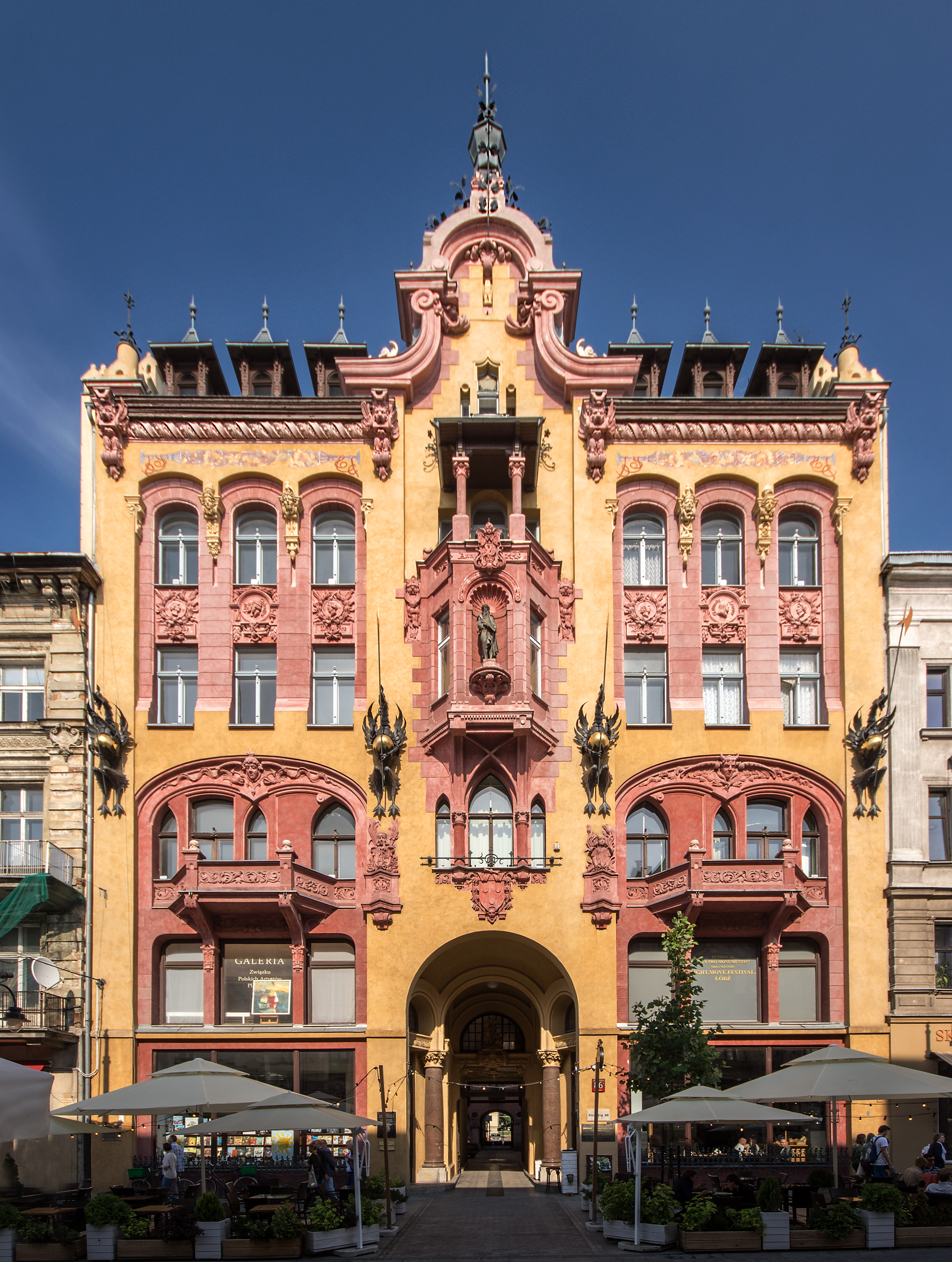 Łódź, kamienica J. Petersilgego, 1896 Wikidata has entry 613240 with data related to this item.